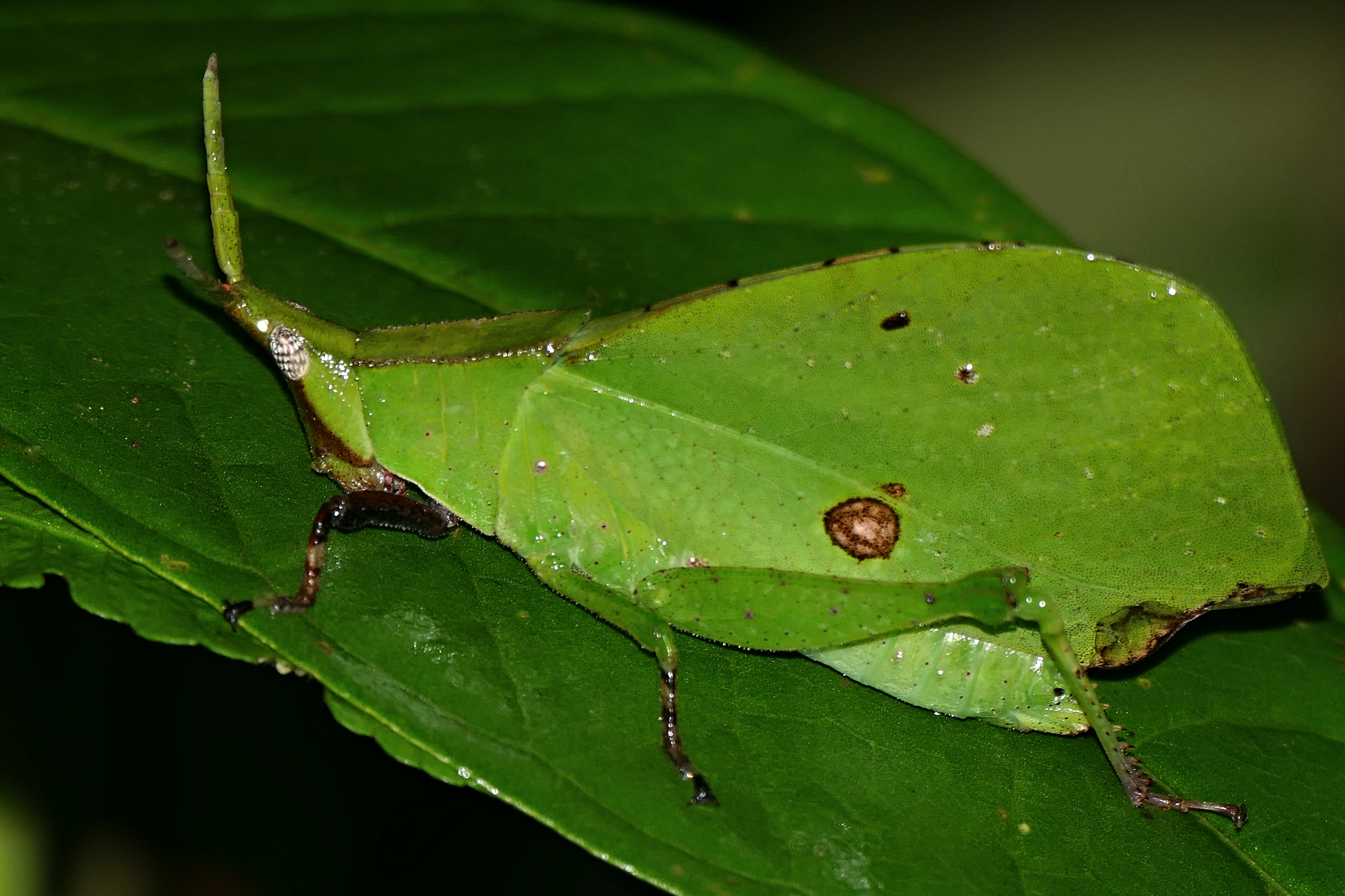 Mulu NP, Sarawak, MALAYSIA